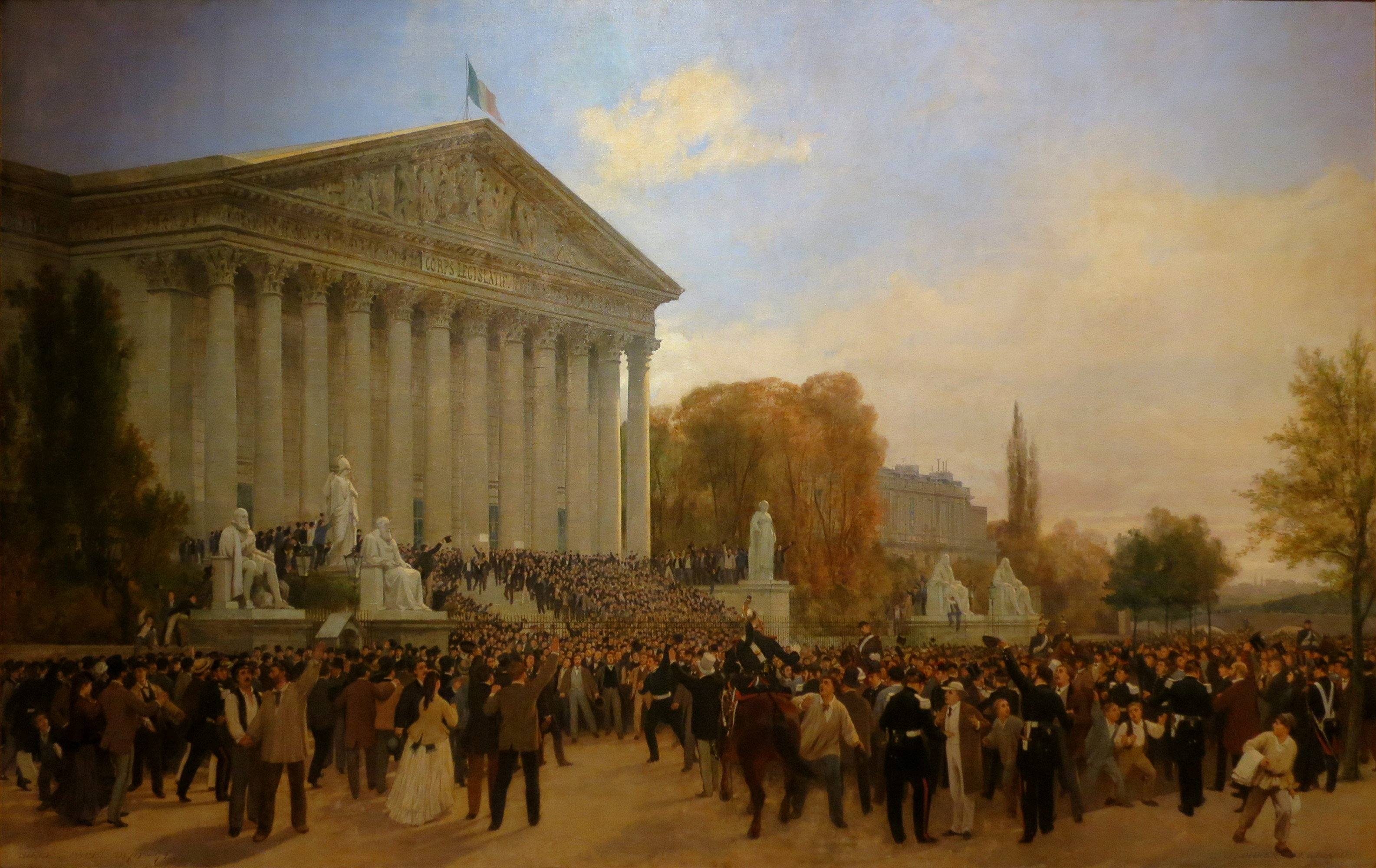 L'annonce de l'abolition du régime impérial devant le palais du corps législatif (à Paris), le 4 septembre 1870title QS:P1476,fr:"L'annonce de l'abolition du régime impérial devant le palais du corps législatif (à Paris), le 4 septembre 1870" label QS:Lfr,"L'annonce de l'abolition du régime impérial devant le palais du corps législatif (à Paris), le 4 septembre 1870"